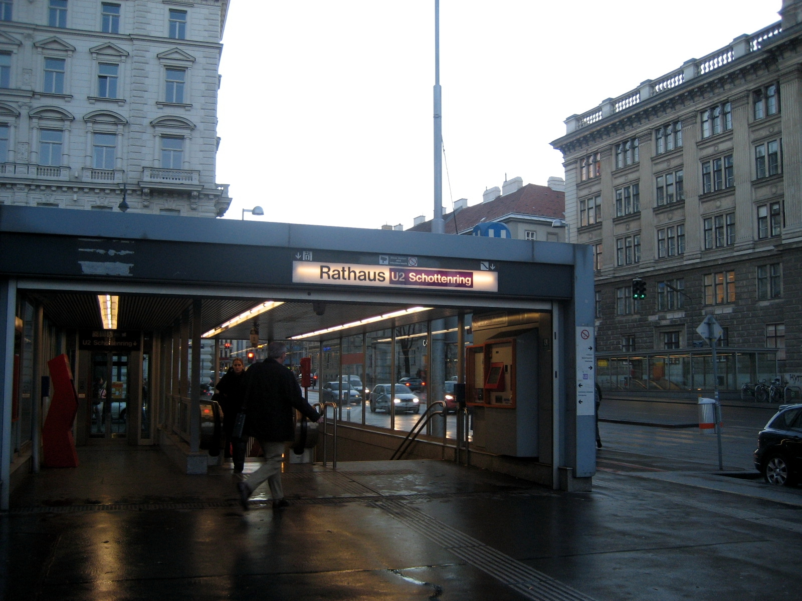 Wien, U-Bahn-Station Rathaus